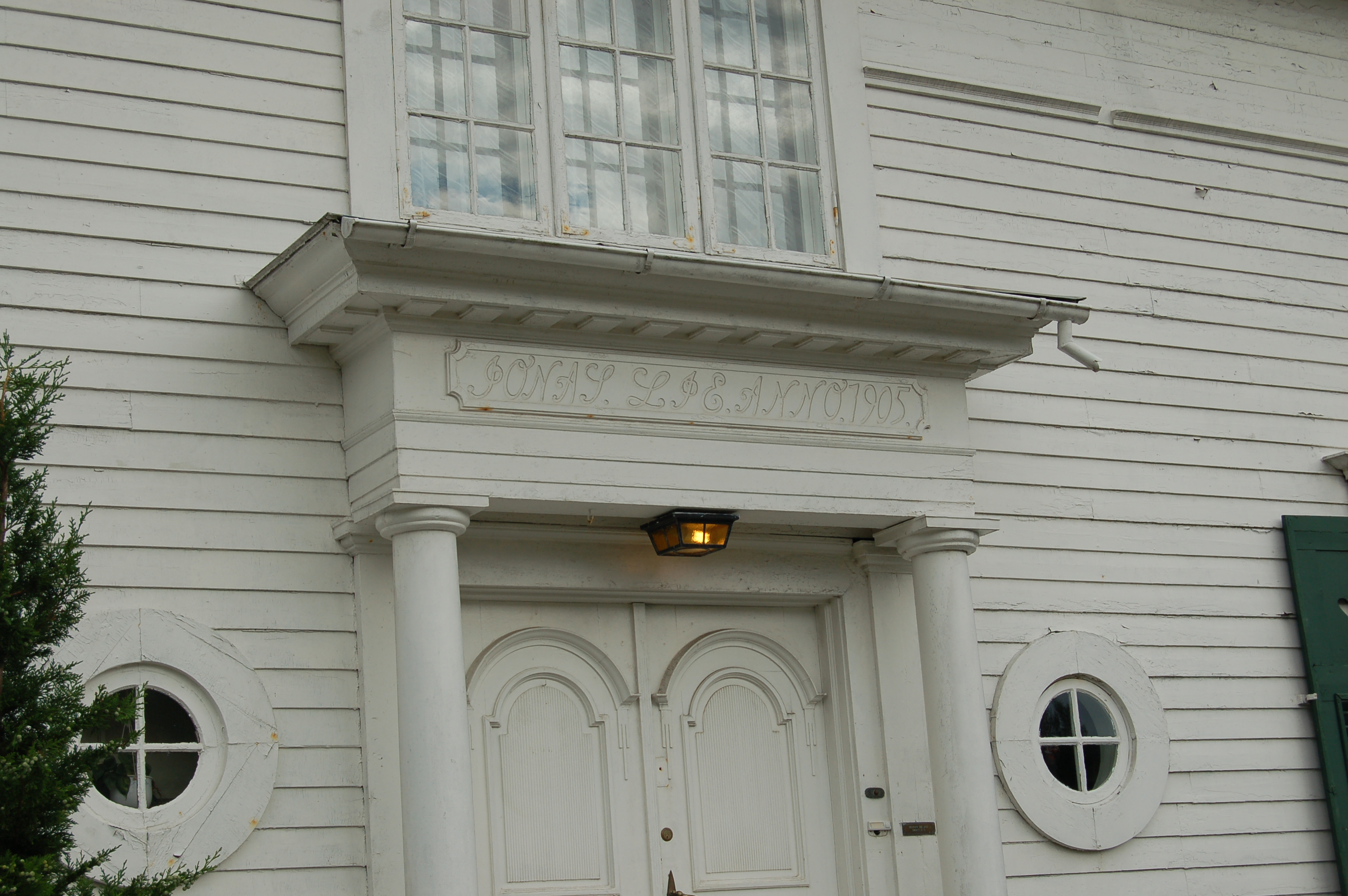 Over døra til huset som ble satt opp av Jonas Lie i Stavern - Elisenfryd.